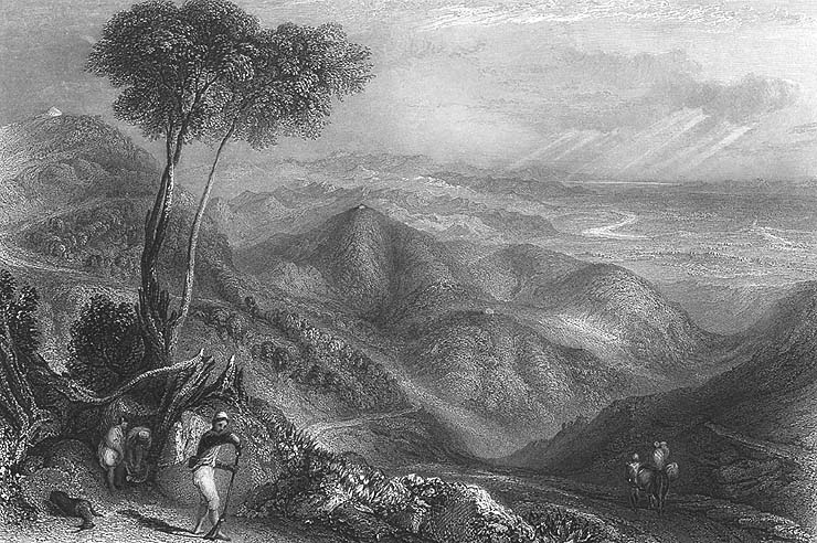 Doon Valley, Dehradun, 1850s